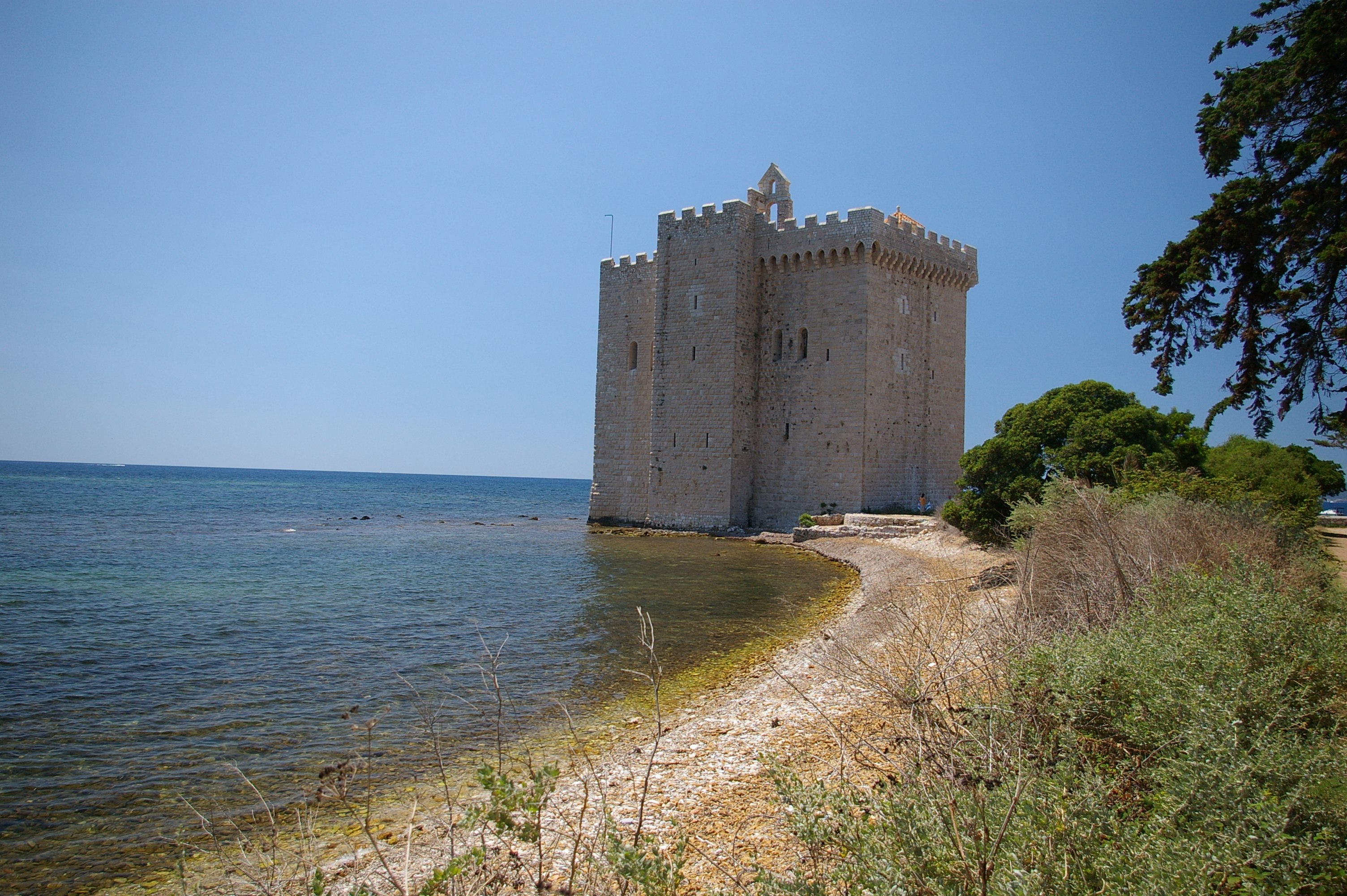 Île Saint-Honorat